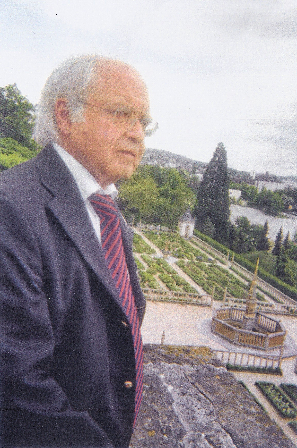 Horst Schmid-Schickhardt im Leonberger Pomeranzengarten, angelegt von Heinrich Schickhardt